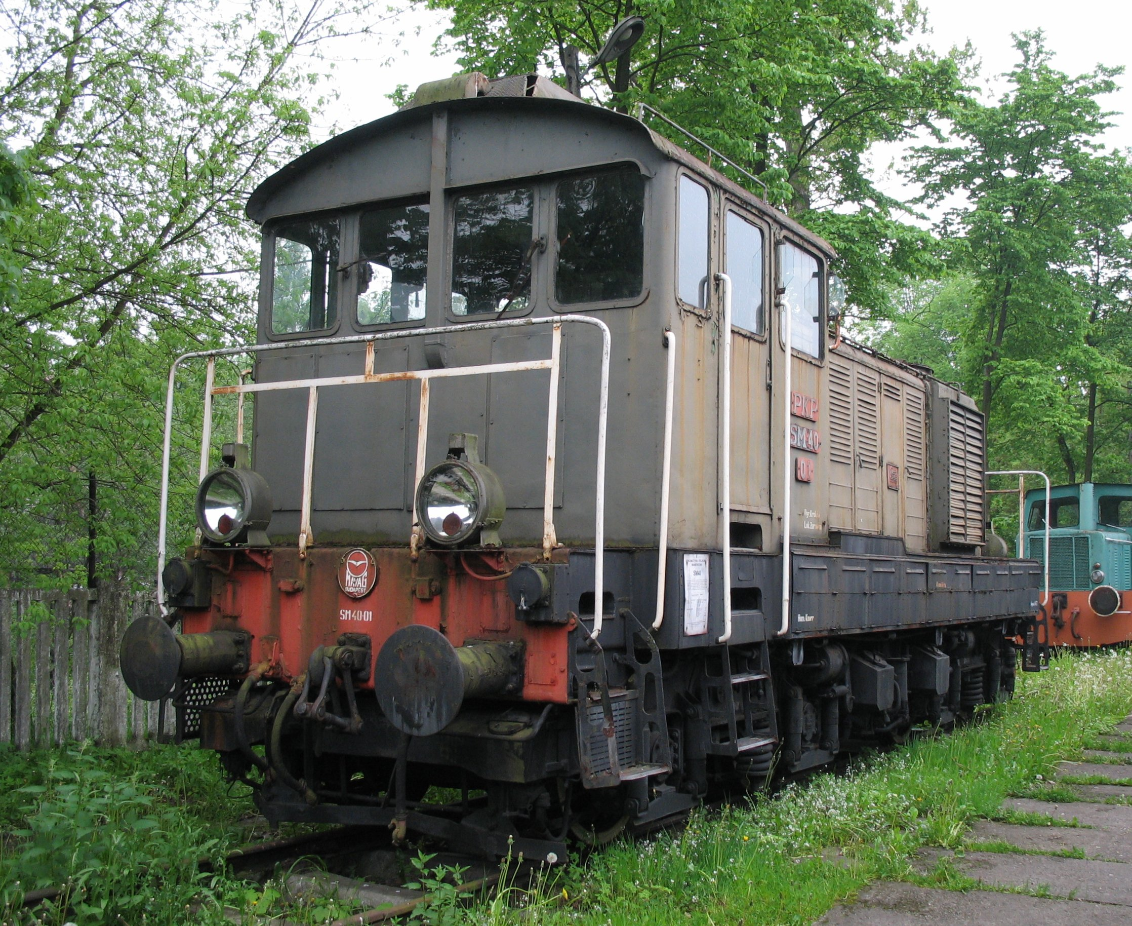 Spalinowa lokomotywa manewrowa SM40-01. Eksponat skansenu taboru kolejowego w Chabówce